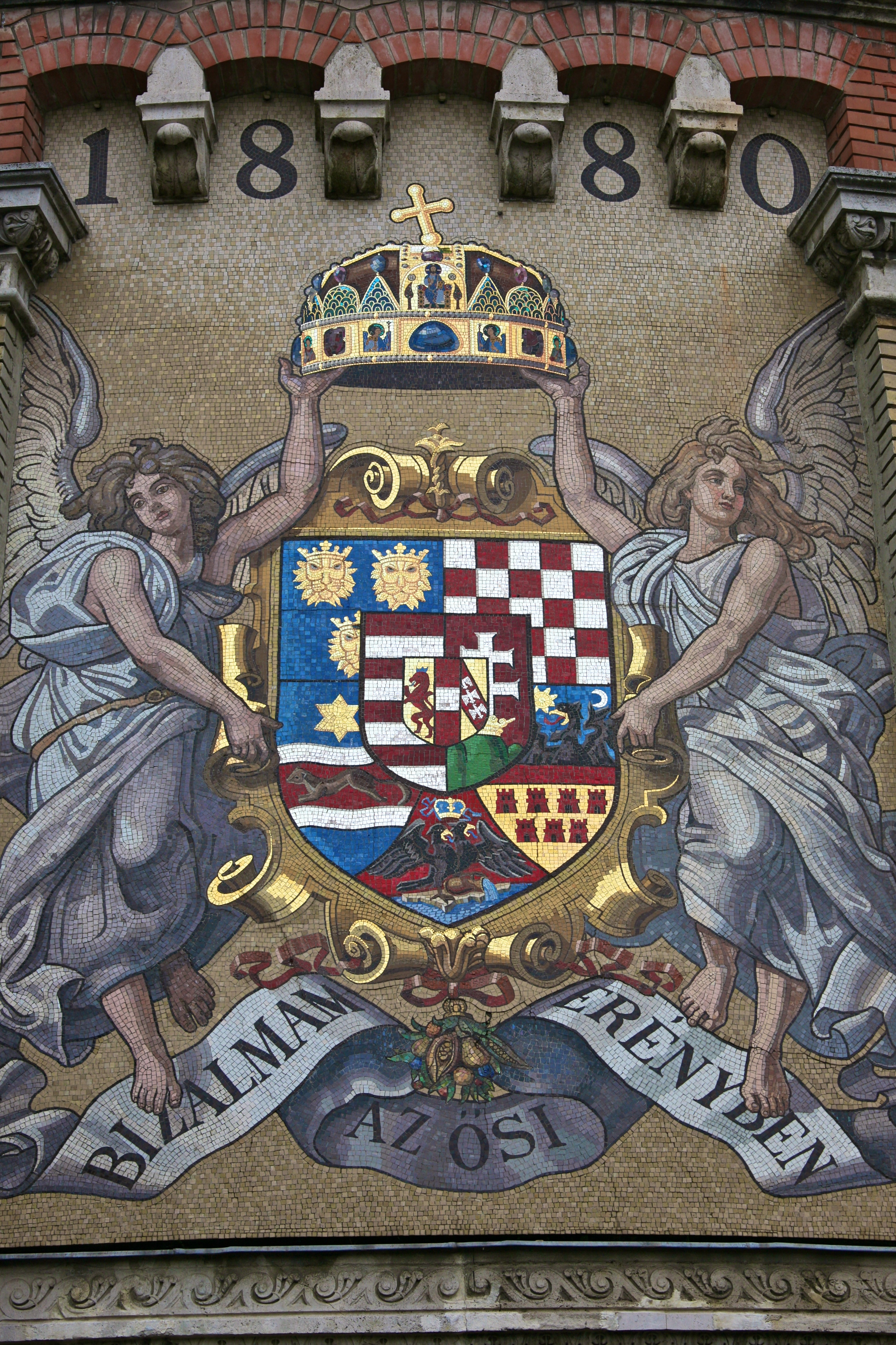 Bizalmam az ősi erényben – Ferenc József királyi jelmondata. Latin eredetije: Virtuti confido (bízom az erényben). Ebben a formában a király 1867-es megkoronázása alkalmából vert emlékpénzre került rá, míg a magyar változat később több pénzérmén is felbukkan. A Kárpátia együttes egyik dalának is a címe. - Budapest, Clark Adam tér